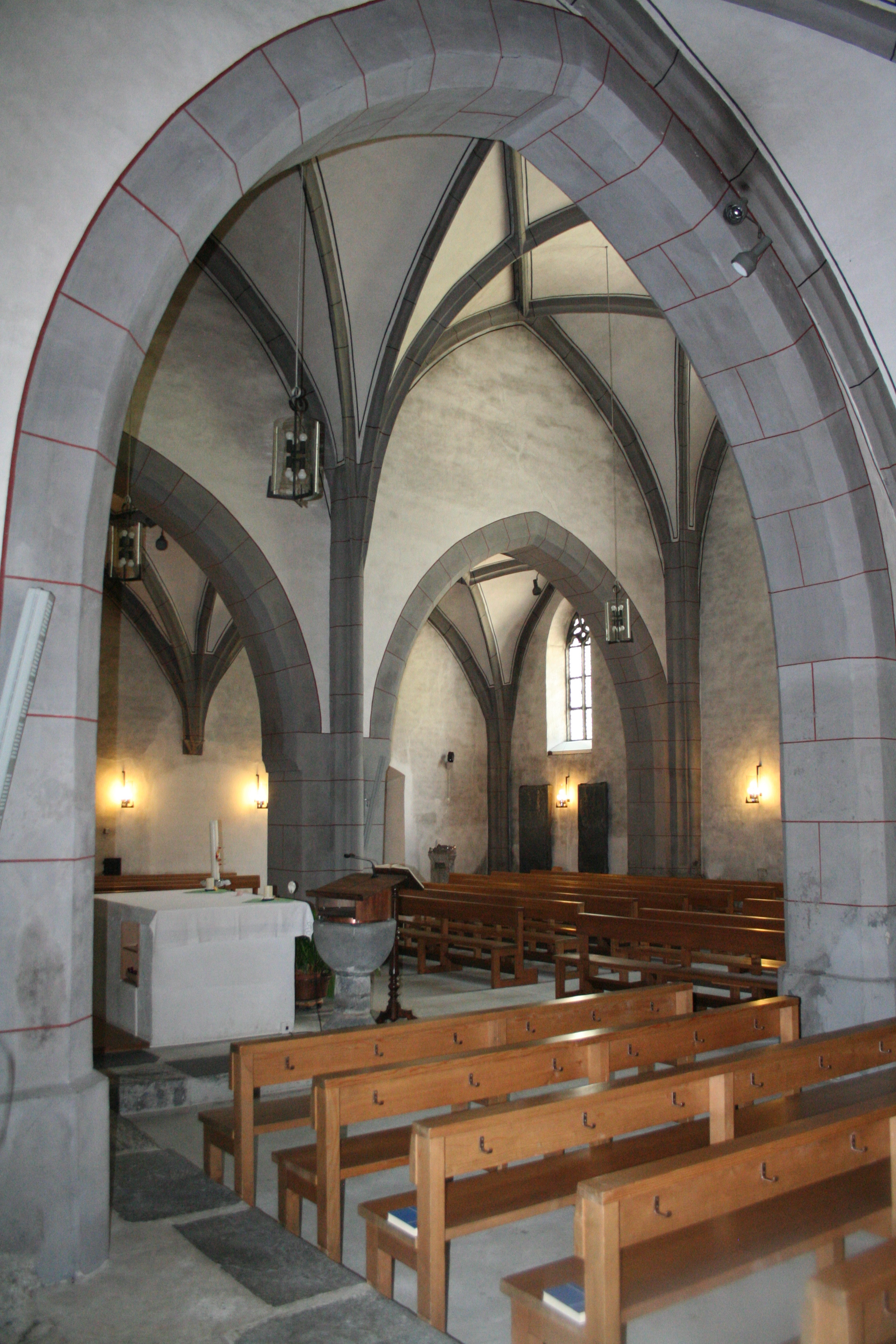 Kirche St. Maria und Michael in Churwalden, Innenraum